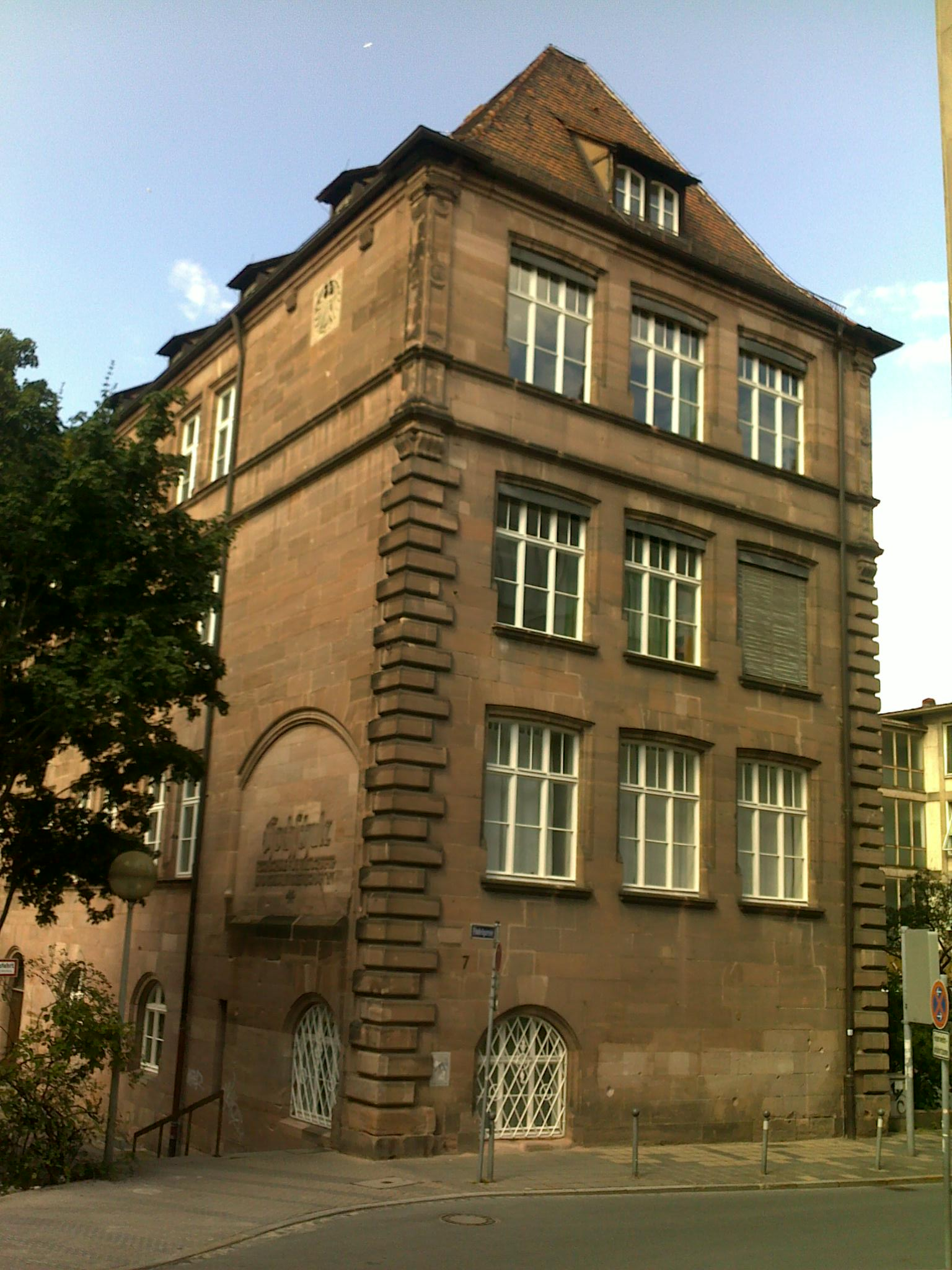 Nürnberg, Ehemalige Handelsschule bzw. Hochschule für Wirtschafts- und Sozialwissenschaften, jetzt Friedrich-Alexander-Universität Erlangen-Nürnberg, Neu-Nürnberger-Stil 1900/1901, Findelgasse 7#